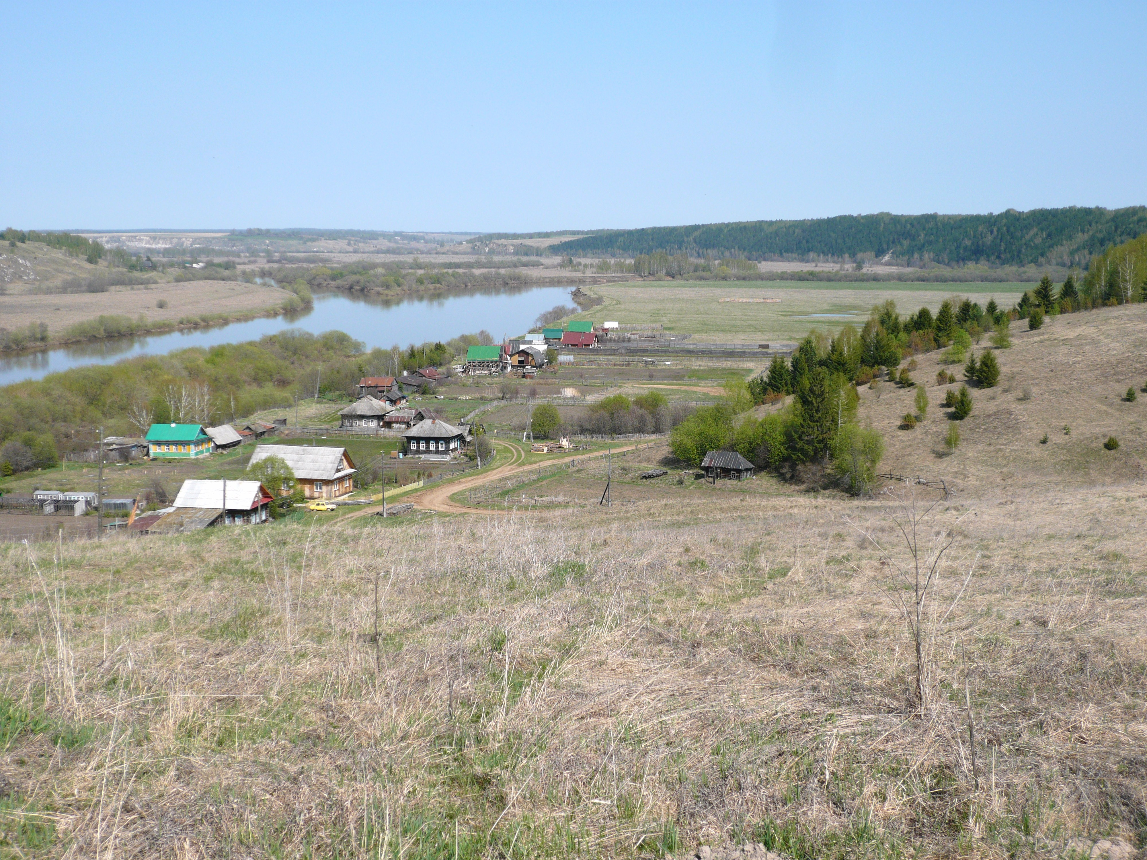 Village Posad.Деревня Посад